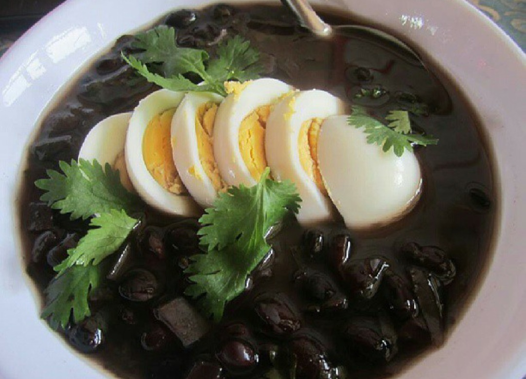 Versión jpg del archivo Archivo:Sopa negra tica 01.png